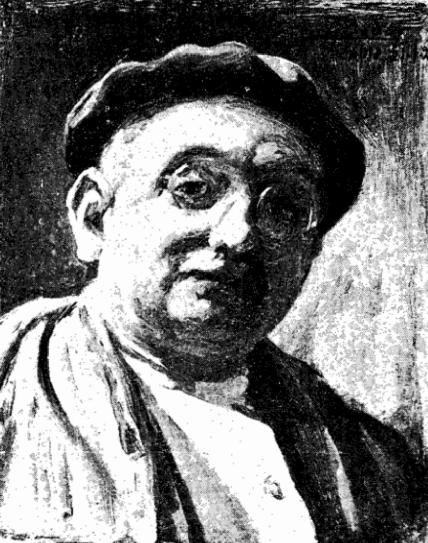 Pintor, dibujante y maestro gaditano, español.